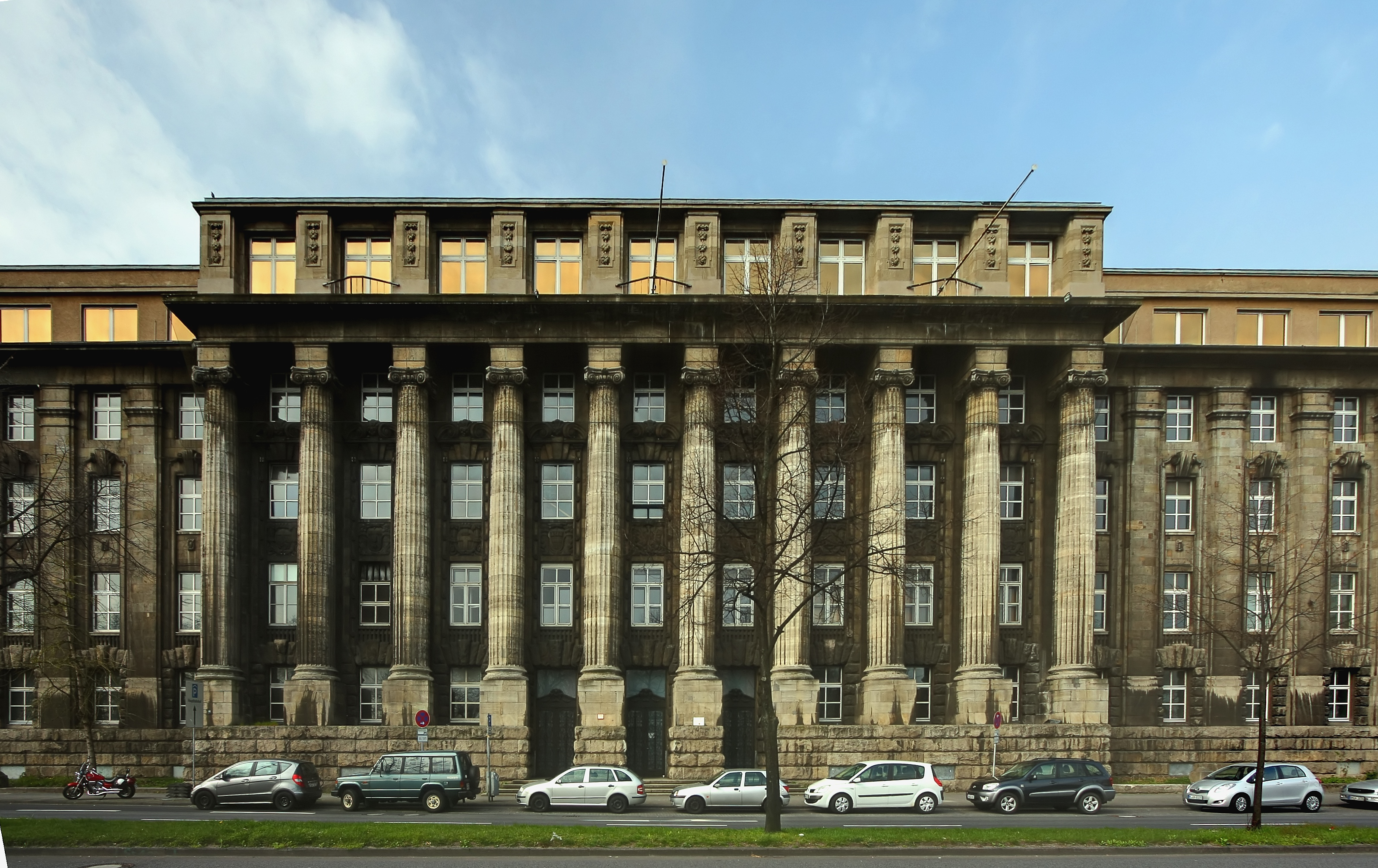 Denkmalgeschützte ehemalige Reichsbahndirektion/Bundesbahndirektion, Konrad-Adenauer-Ufer 3, Köln. Architekten: Karl Biecker, Adolph Kayser und Martin Kießling, Baujahr: 1912/13